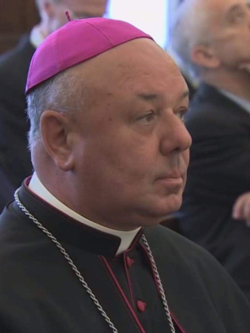 Mgr Sergio Pagano à l'audience du pape François donné pour le comité pontifical des sciences politiques.